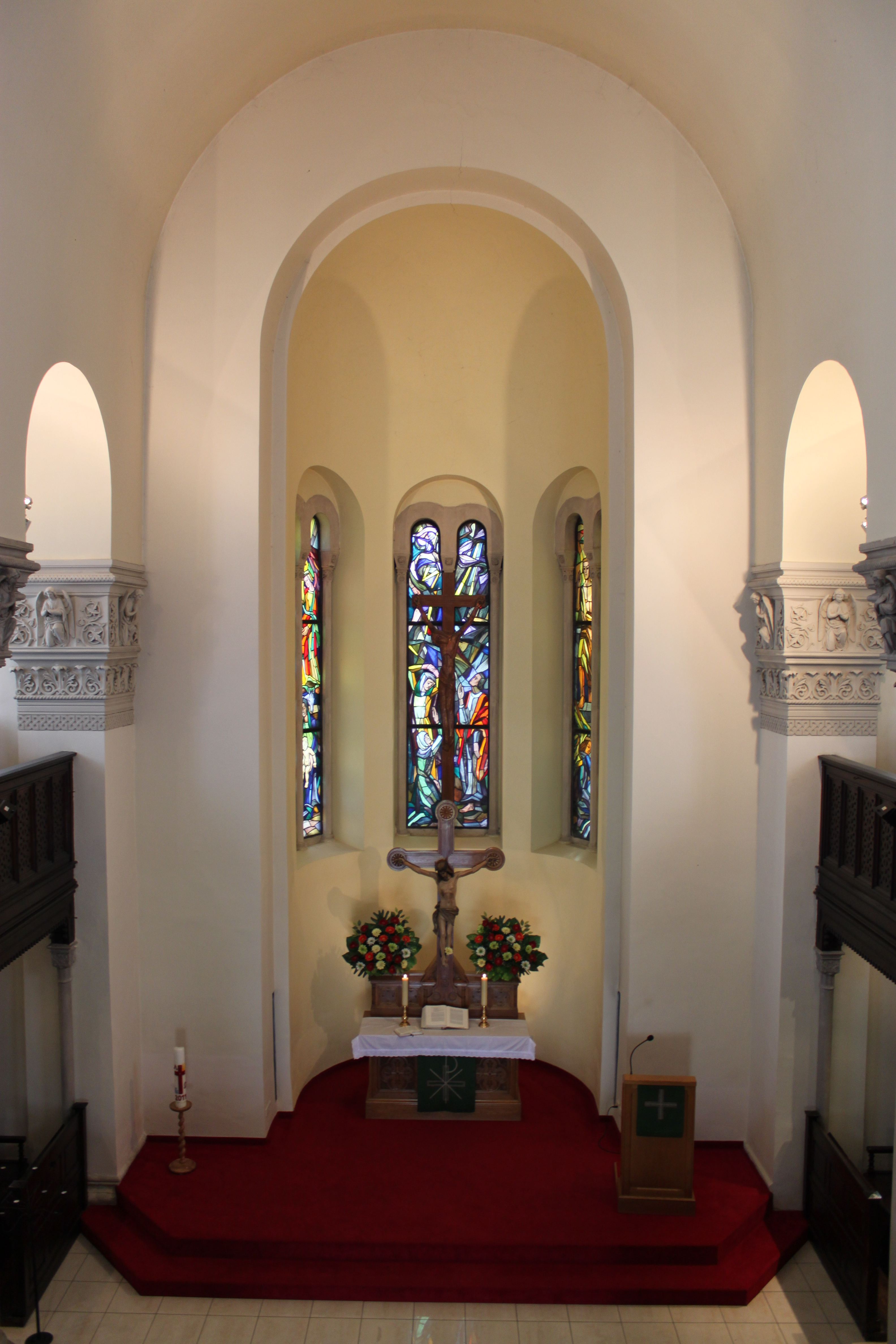 Innenraum der Christuskirche am Matzleinsdorferplatz, Wien 10.